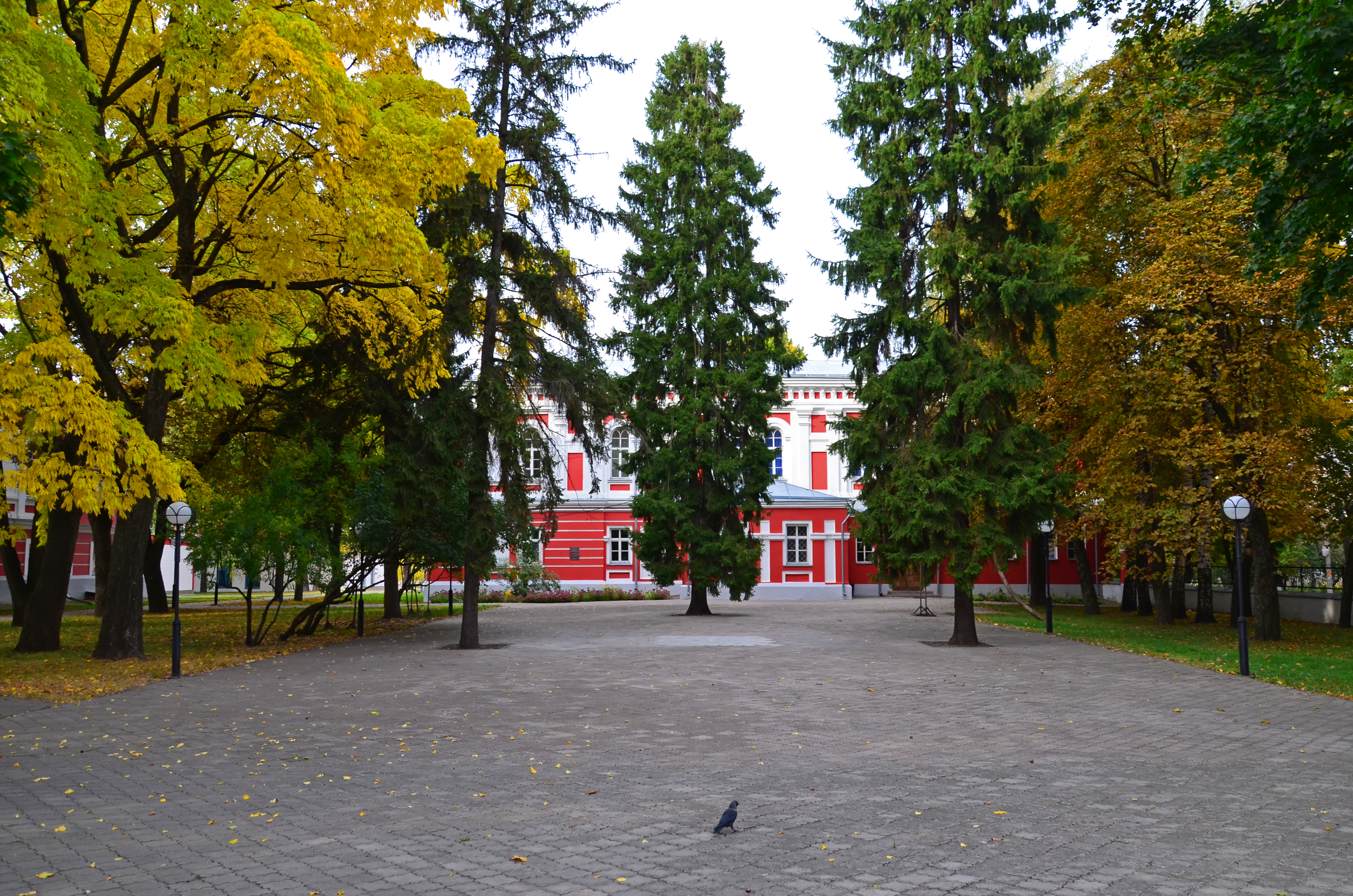 «Екзотичні дерева Глухівського педуніверситету», м. Глухів; на розі вулиць Радянська та Карла Маркса